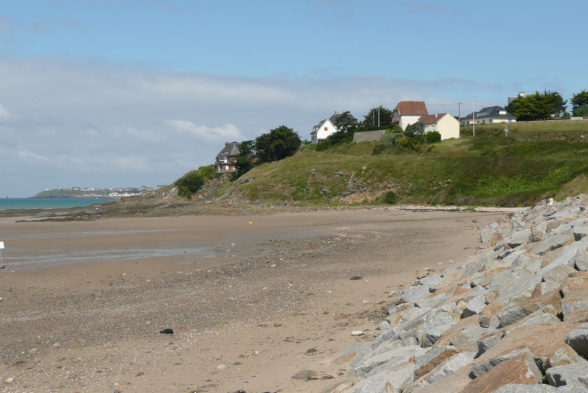 Saint-Pair-sur-Mer.